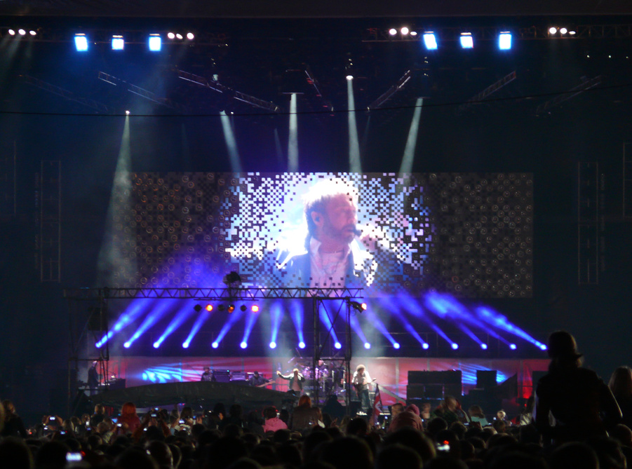 Благотворительный АнтиСПИД концерт группы Queen + Paul Rodgers на площади Свободы в Харькове, собравший около 350 тысяч человек.